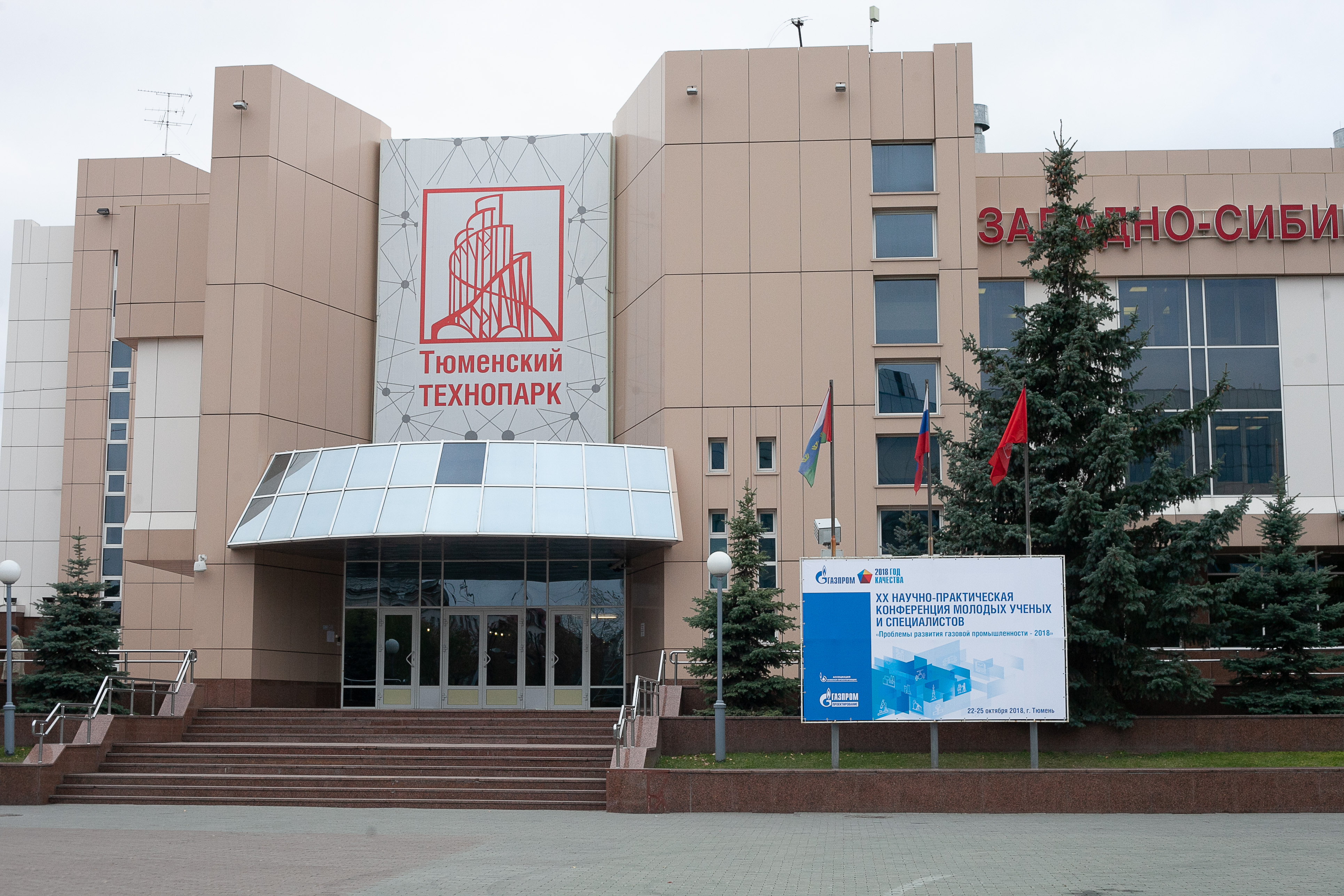 Место проведения XX научно-практической конференции молодых ученых и специалистов «Проблемы развития газовой промышленности». Западно-Сибирский инновационный центр. г. Тюмень. 22.10.2018.